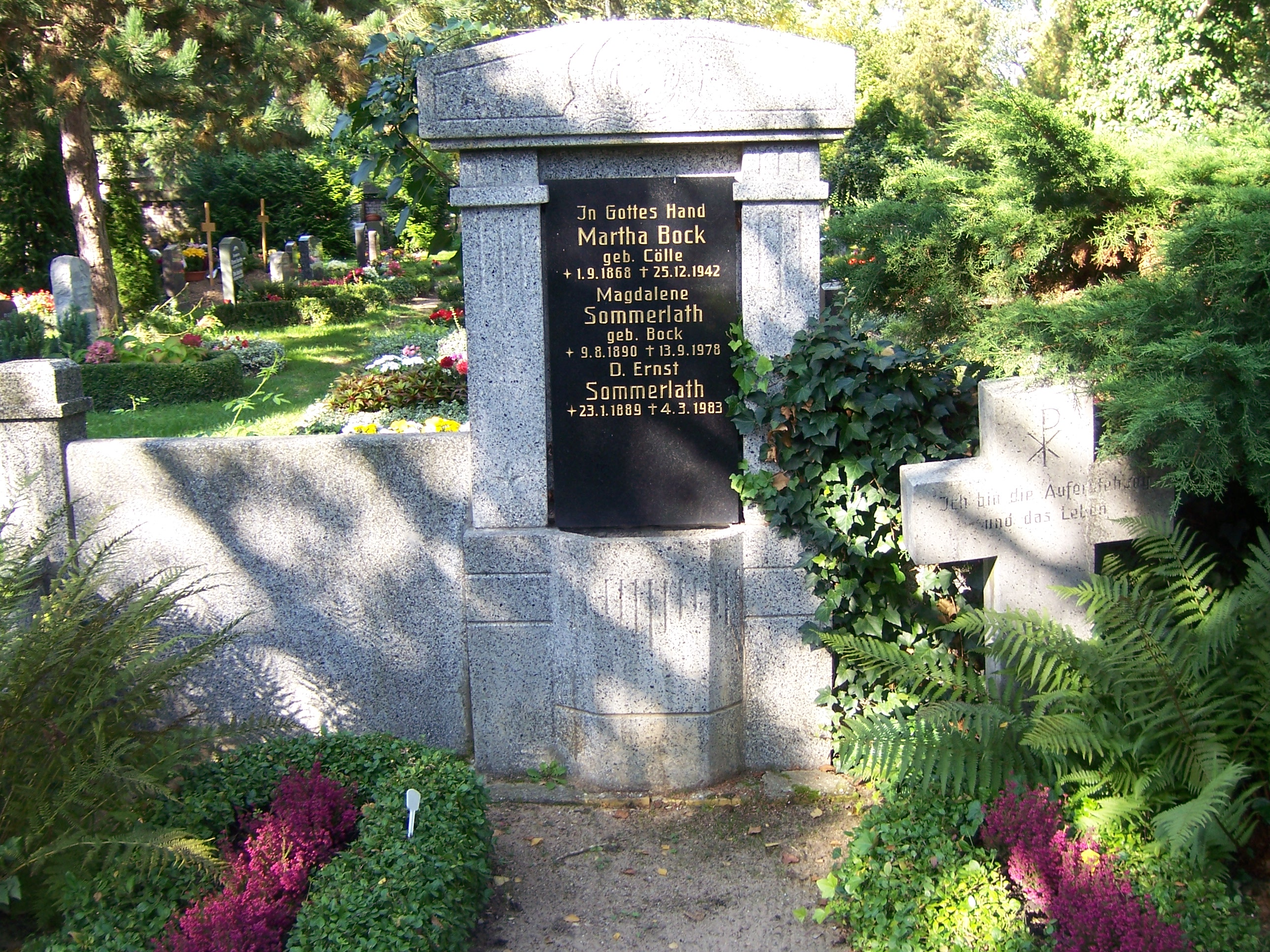 Grabstätte Ernst Sommerlath und Angehörige